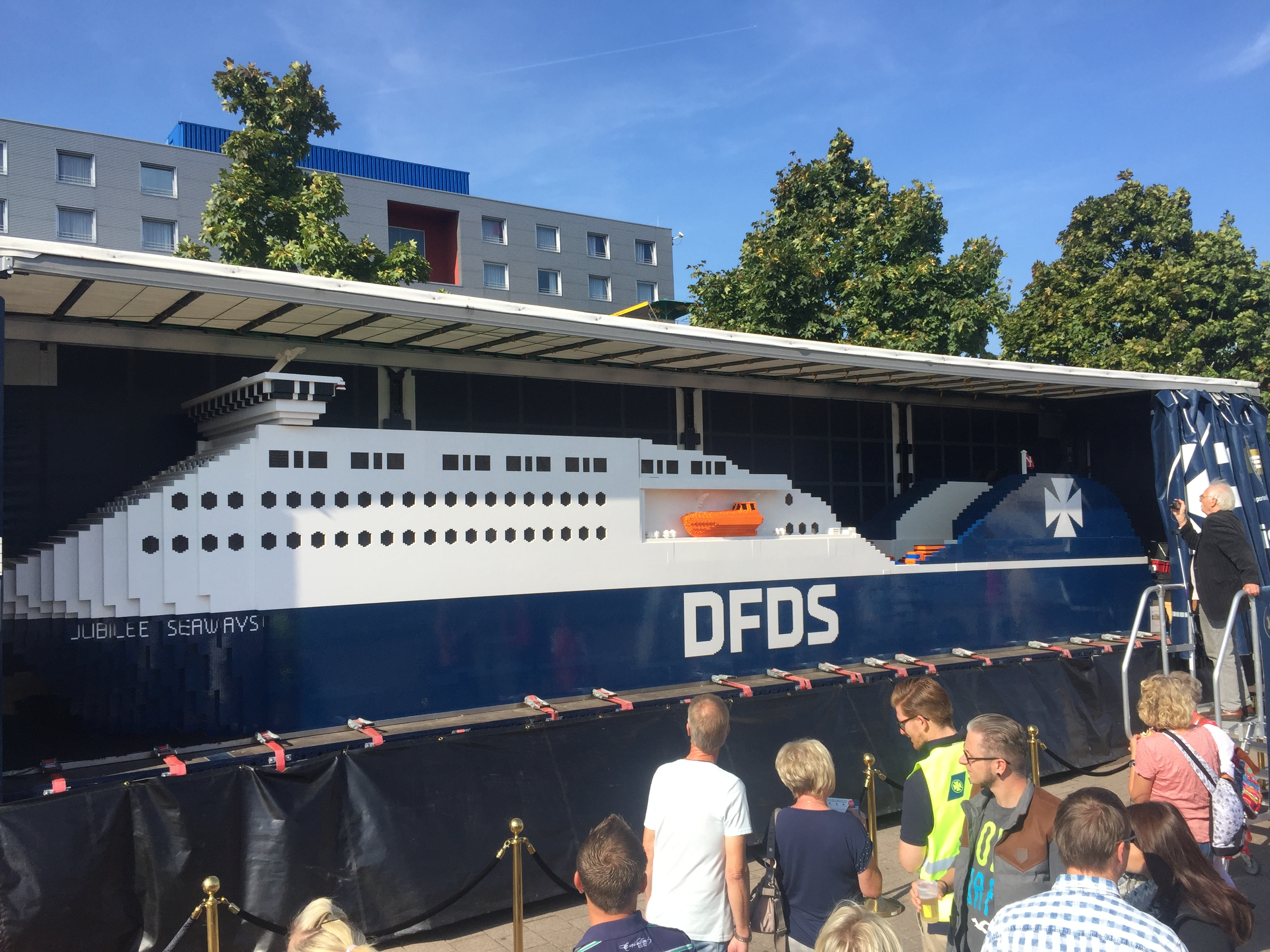 DFDS Jubilee Seaways aus Lego-Bausteinen - das mit mehr als 1 Mio. Steinen größte Lego-Schiff der Welt